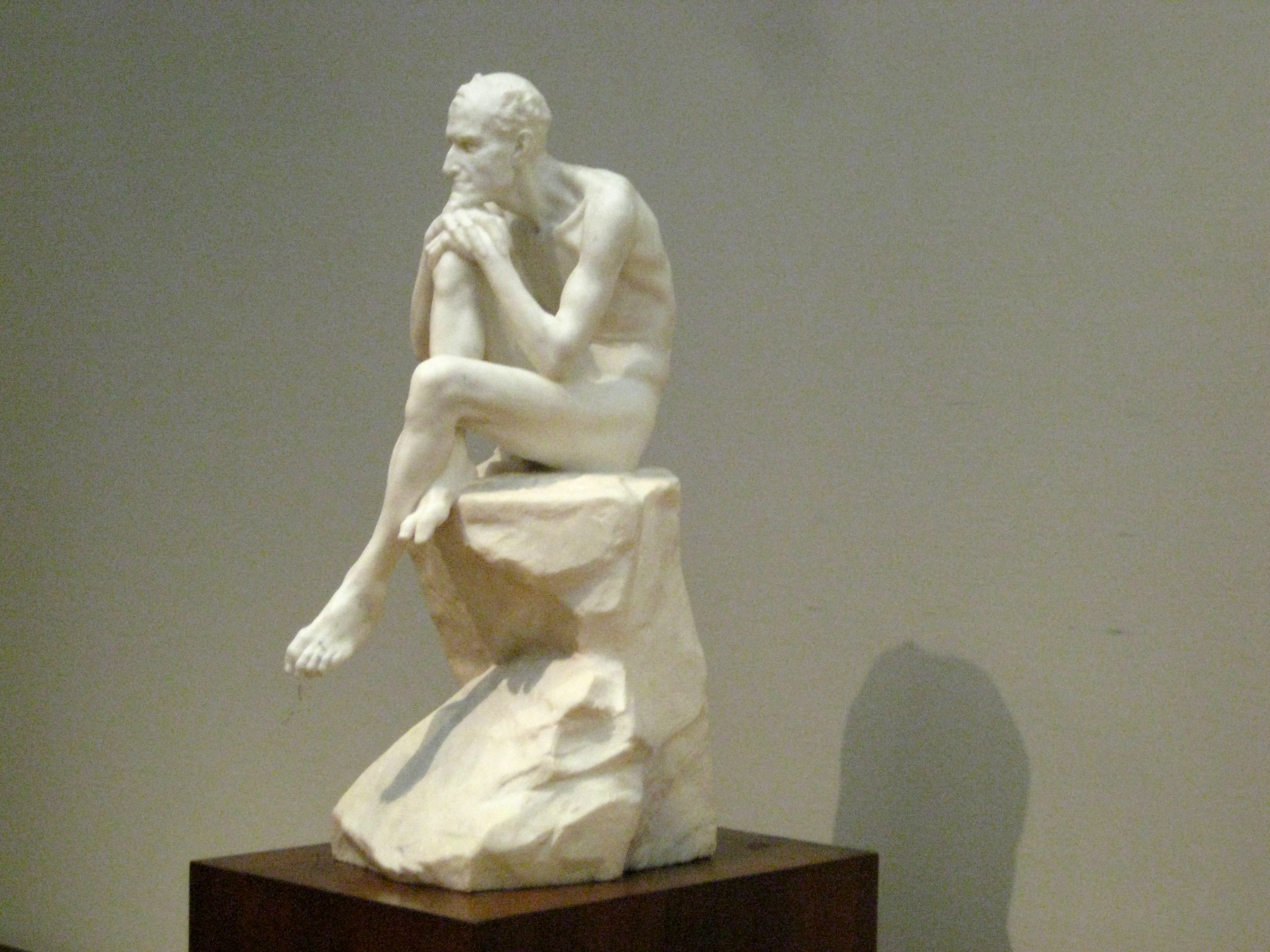 Марк Антокольский. "Мефистофель". После 1883 года. Мрамор. ГТГ. Уменьшенное повторение статуи 1883 года из собрания ГРМ.